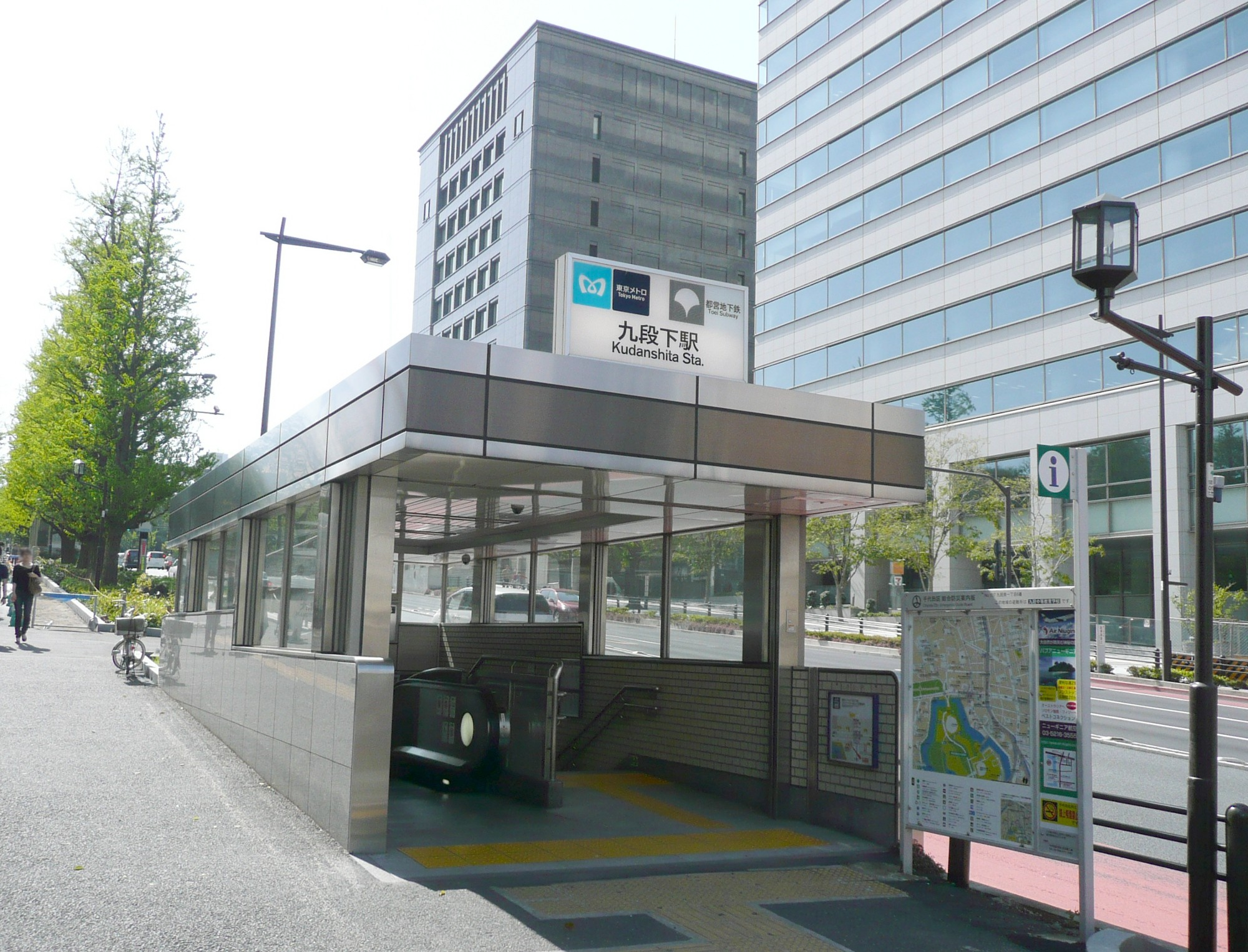 九段下駅4番出入口